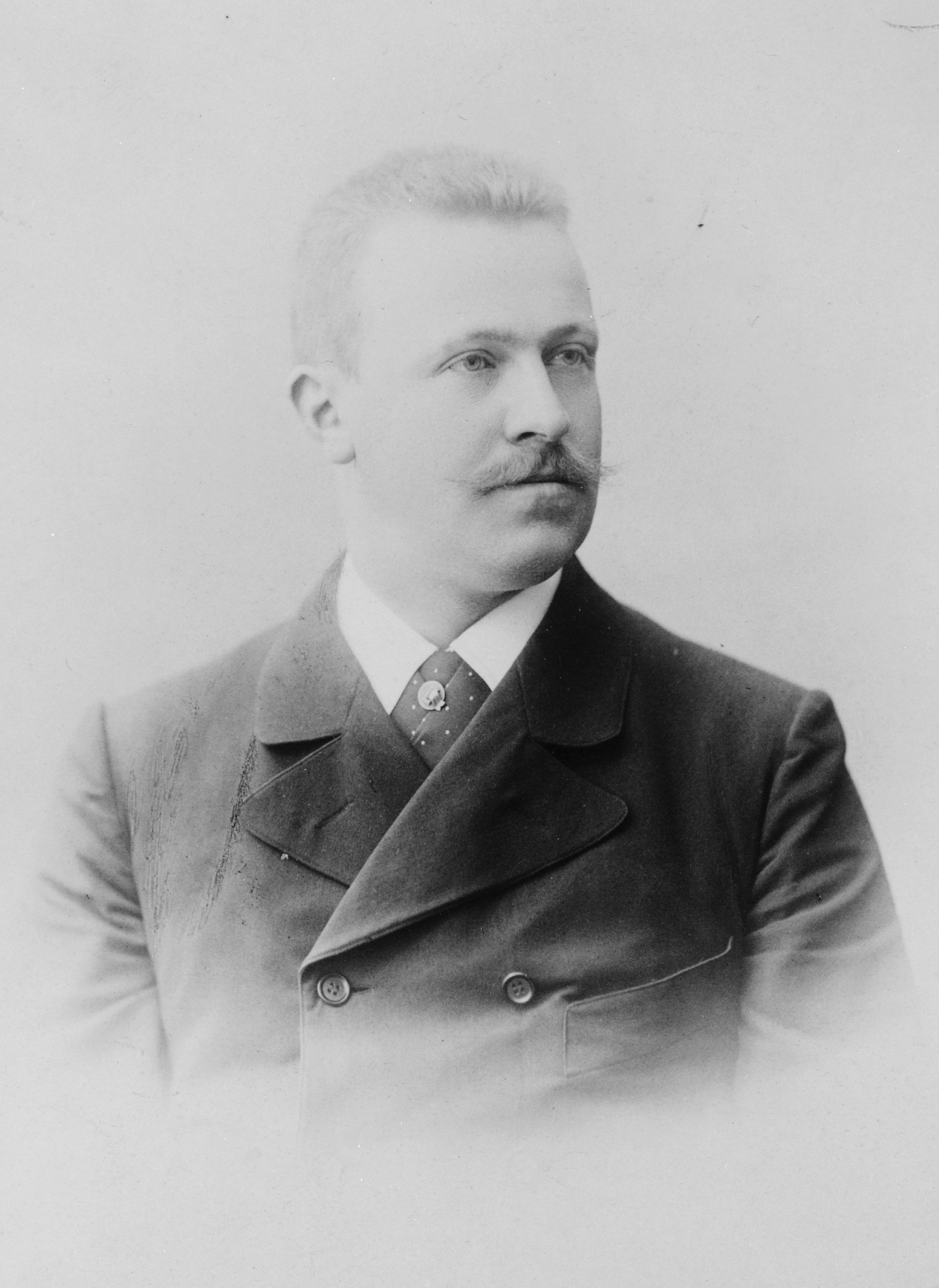 Erich Dagobert von Drygalski